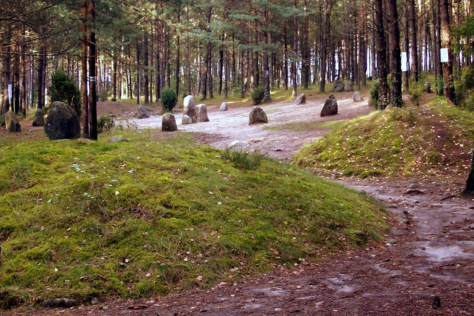 Stone circle and tumulus near Wesiory, Poland. Steinkreis und Grabhügel bei Wesiory, Polen